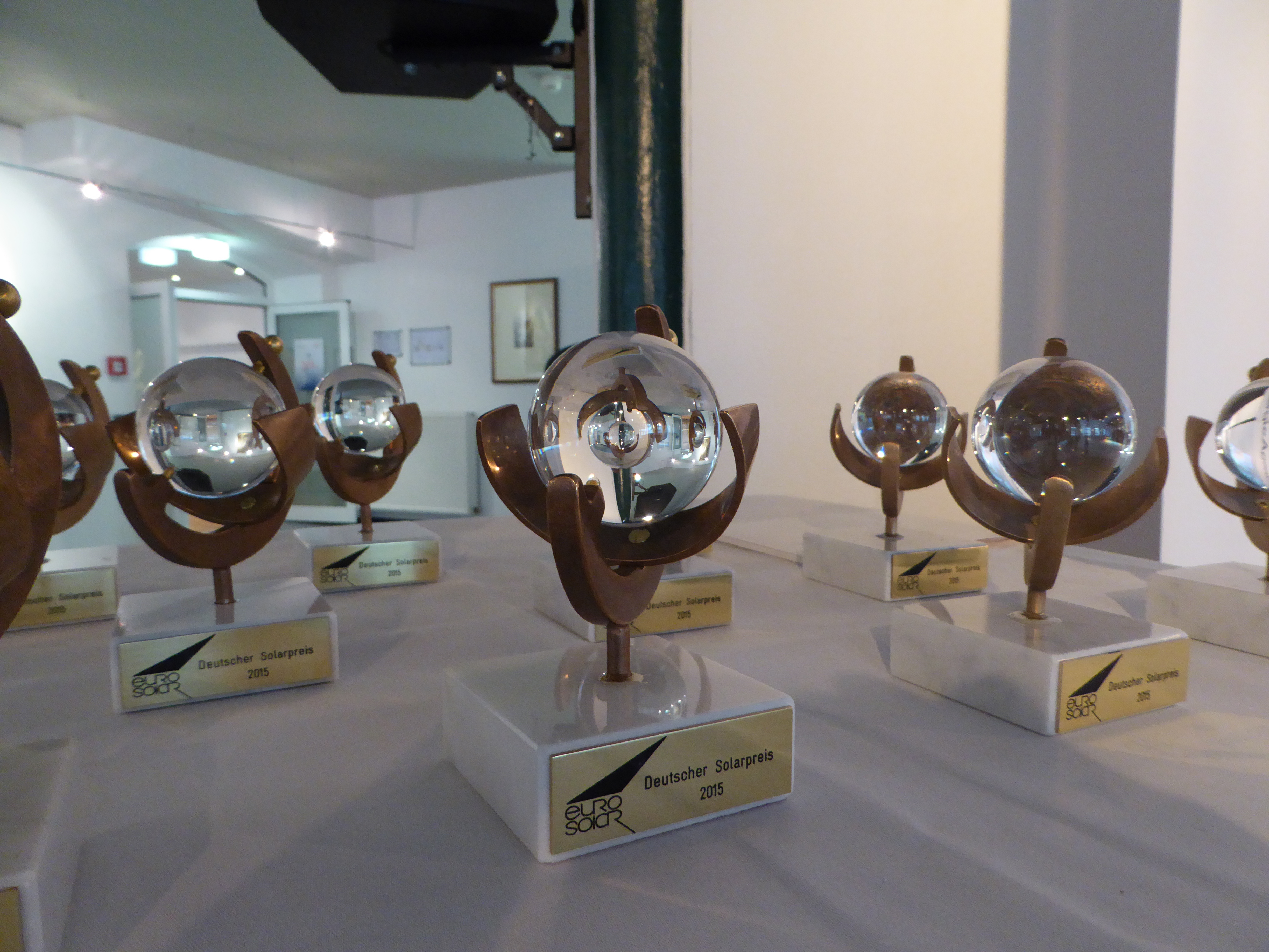 Deutscher Solarpreis 2015 IBACH-Haus Schwelm